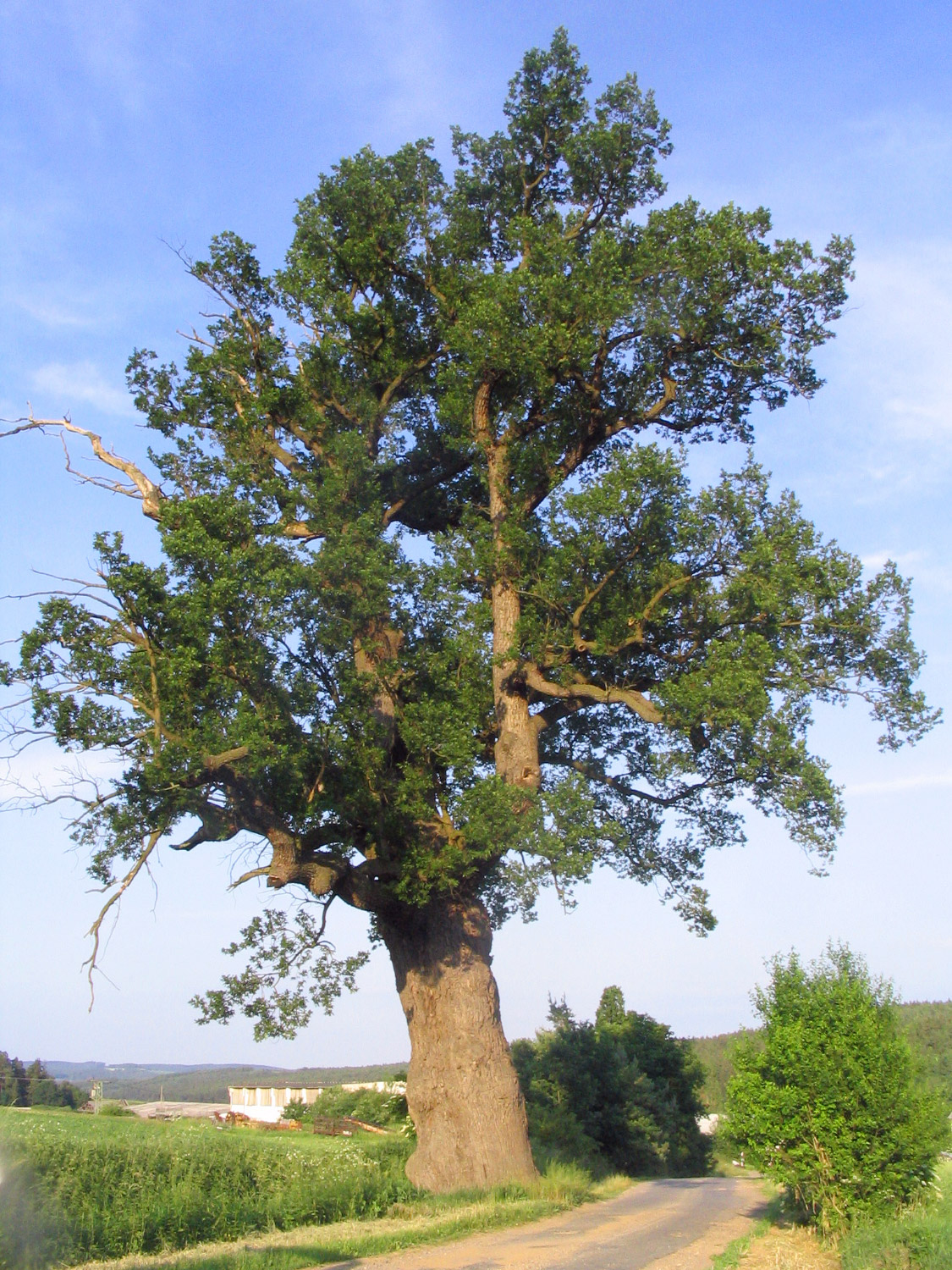 Lomanský dub I.